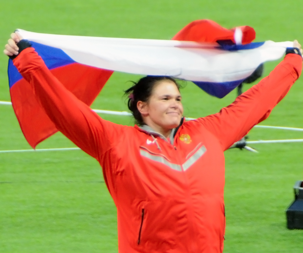 La lanceuse de disque russe Darya Pishchalnikova fêtant sa médaille d'argent aux jeux olympiques de Londres